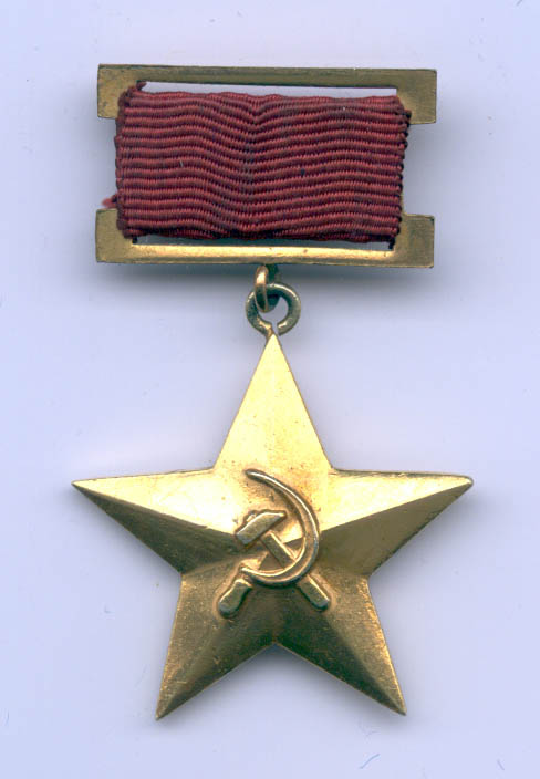 Heroe de la labor socialista